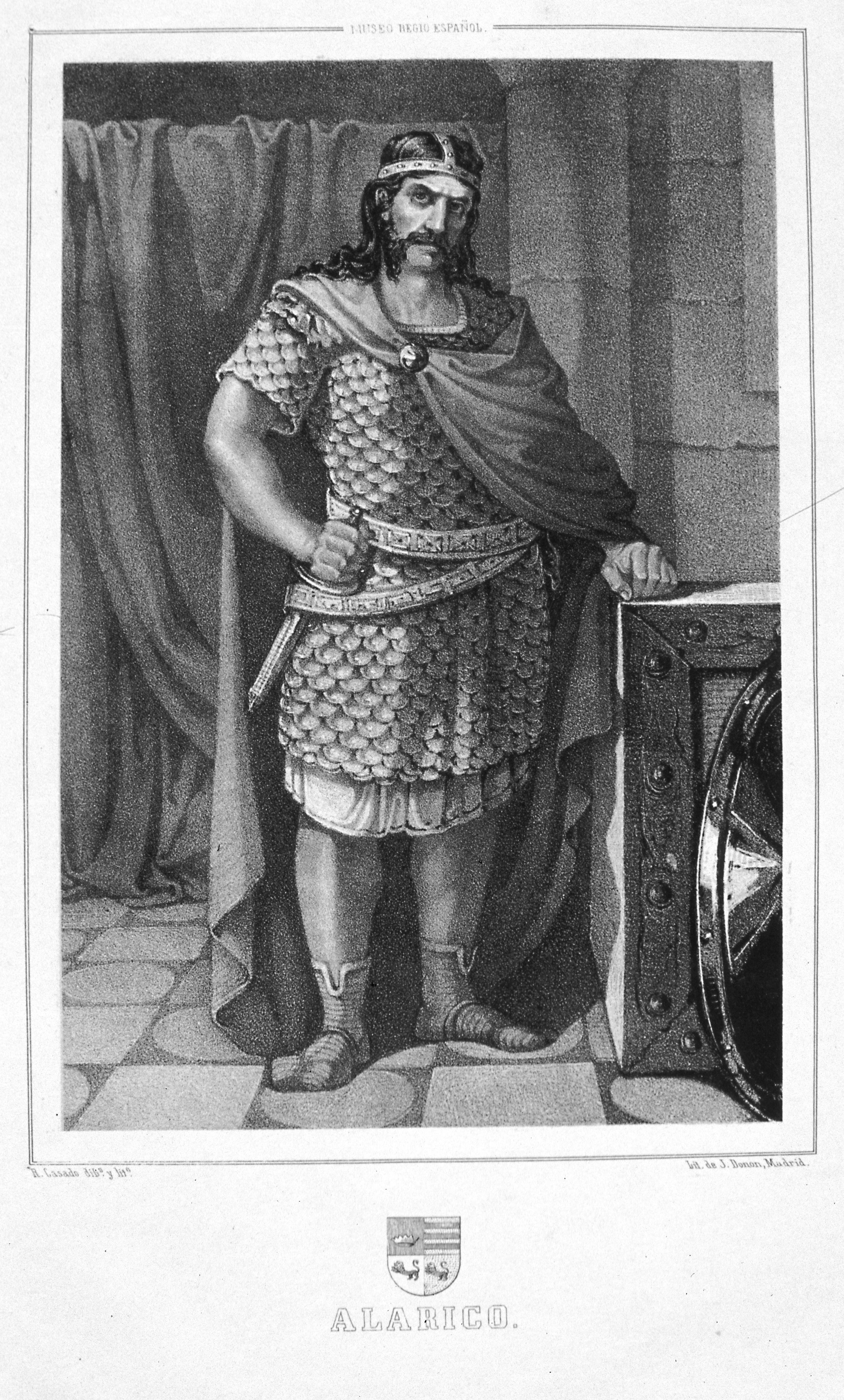 Alarico II, Rey de los Visigodos